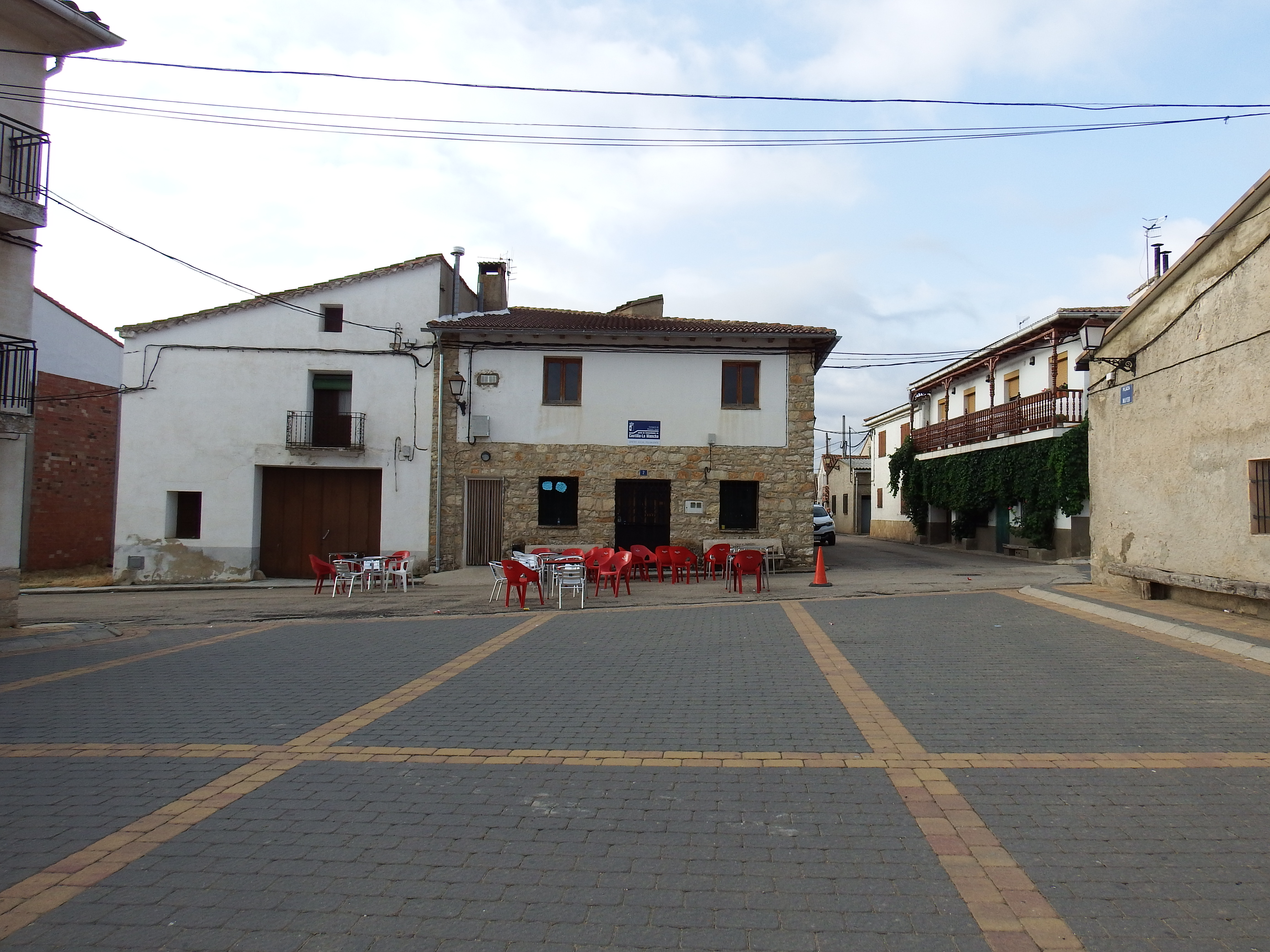 Plaza mayor con el centro social en Campillos-Sierra